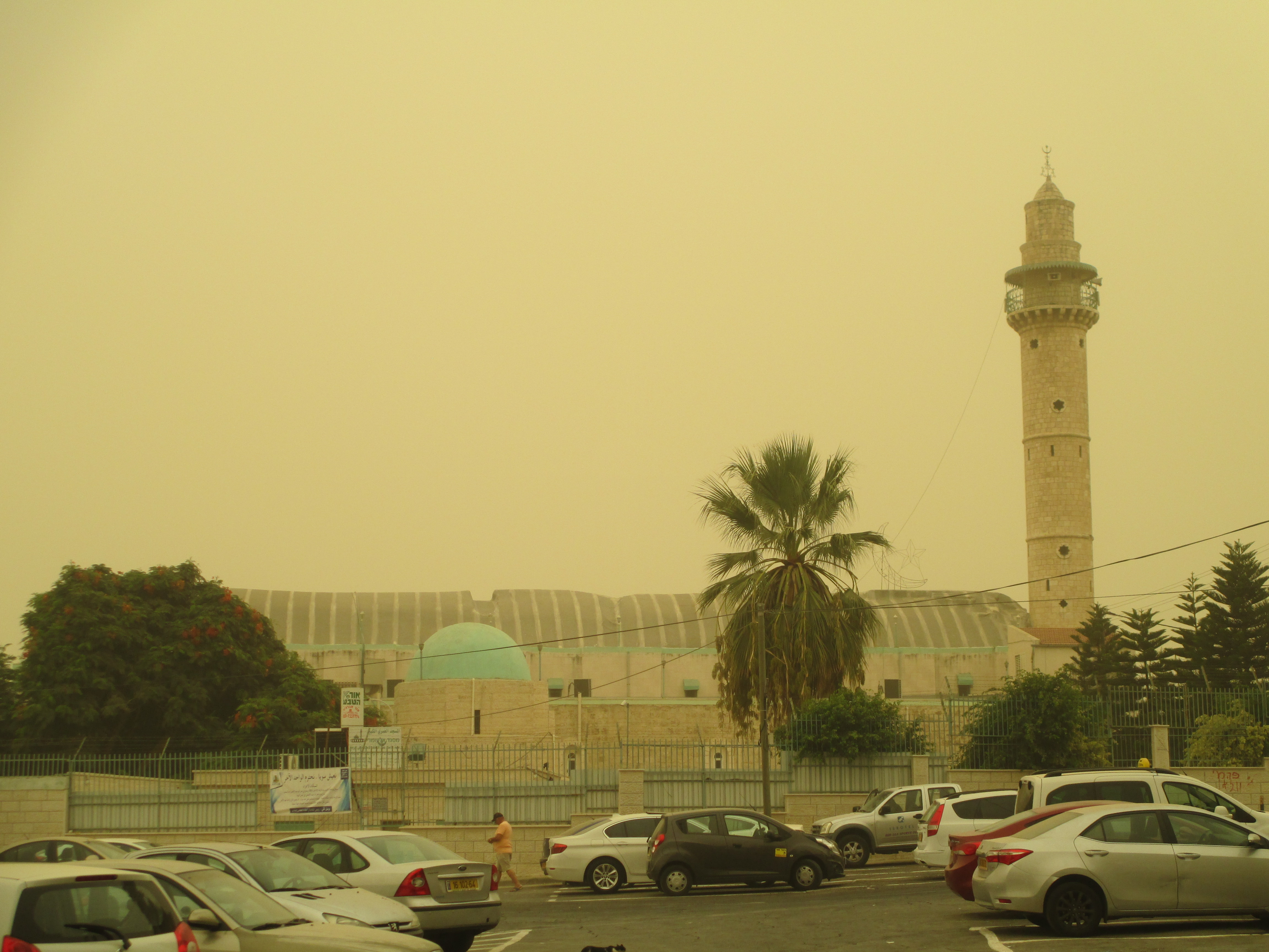 המסגד הגדול ברמלה ביום האובך הגדול